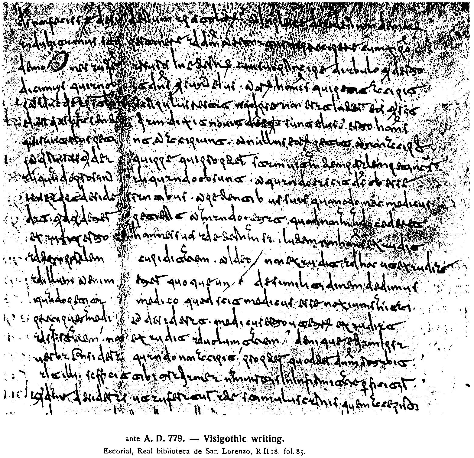 Česky: Vizigótská kurzíva před rokem 779